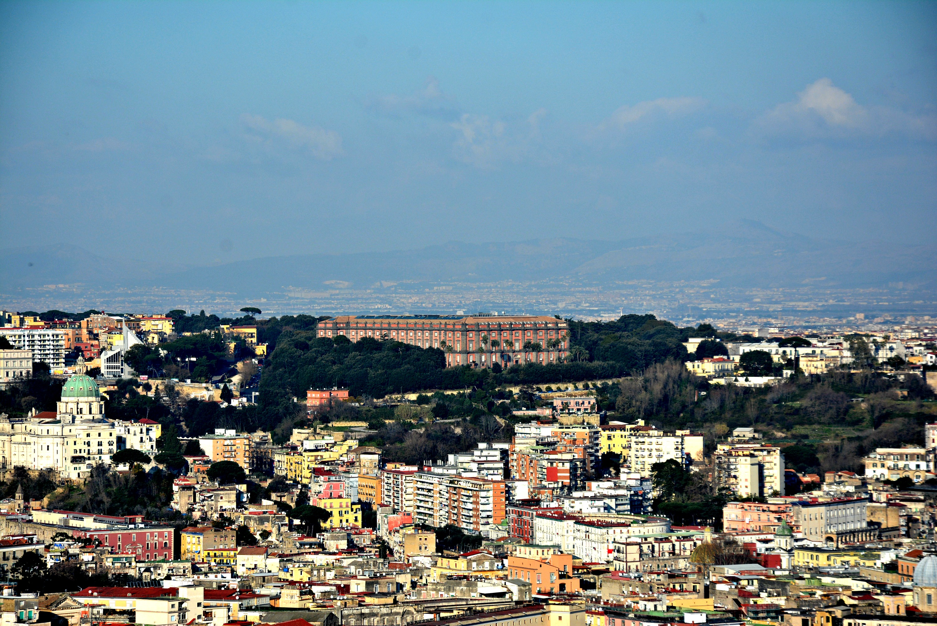 Reggia di Capodimonte dalla Certosa di San Martino